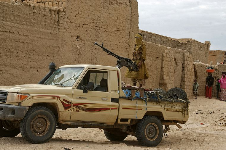 Pick-up djihadiste à Tombouctou en 2012.